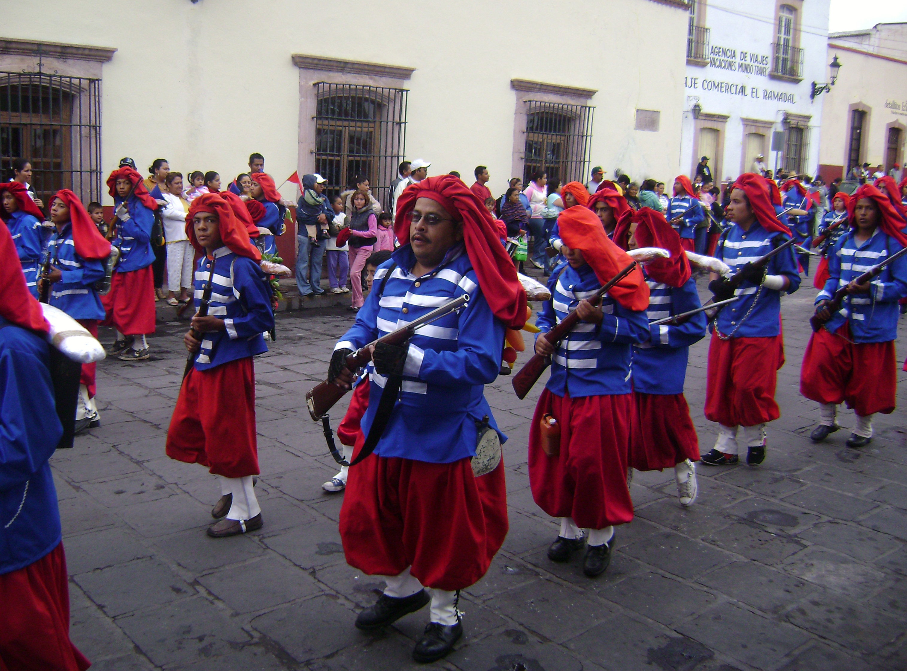 Desfile de las tradicionales Morismas de Guadalupe (Zacatecas)